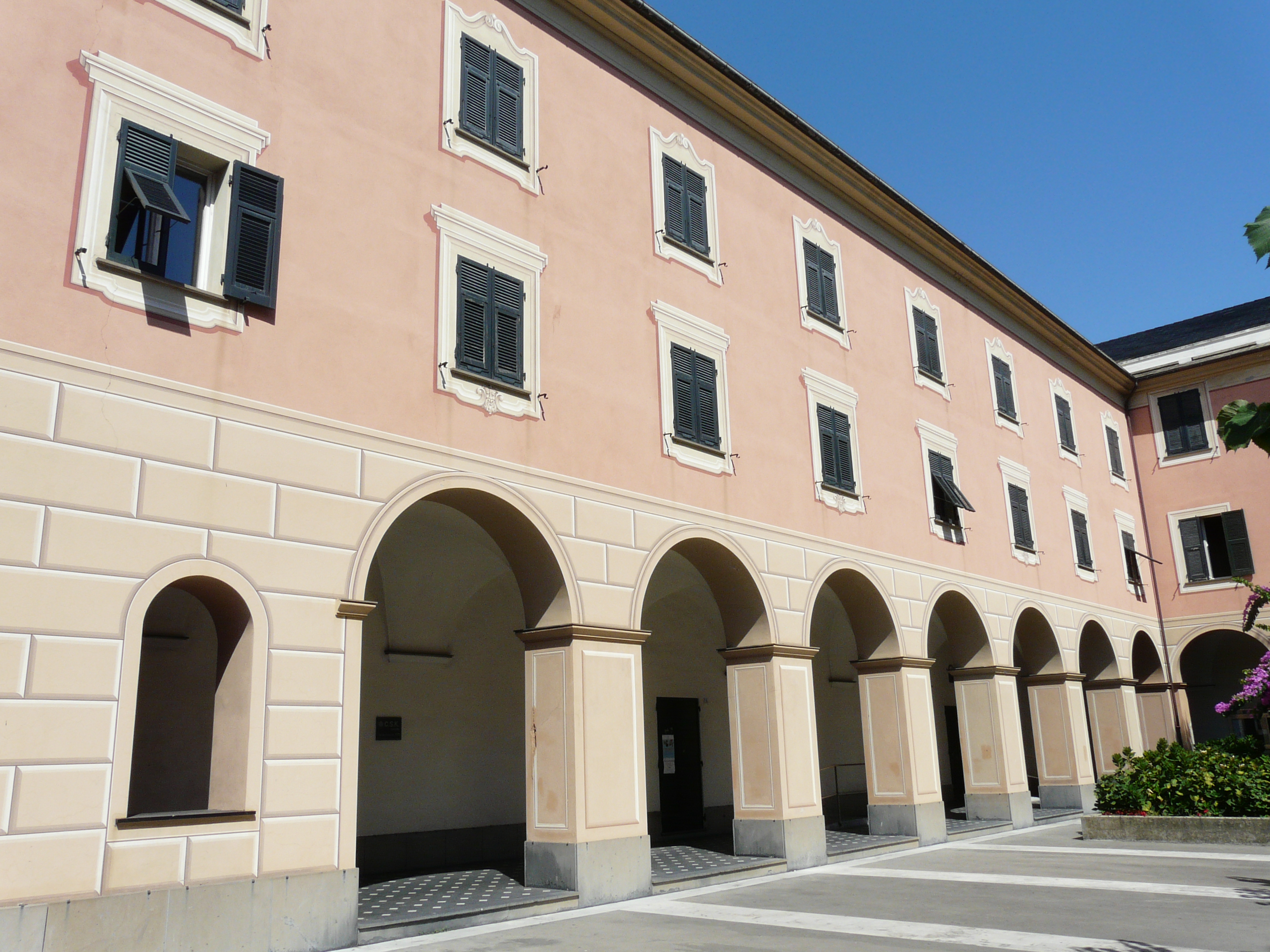 Biblioteca Civica e museo, Lavagna, Liguria, Italia